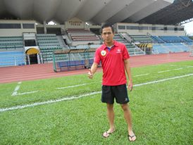 Zoran Robertson, Stadium Negeri Sarawak, Petrajaya Kuching, Sarawak